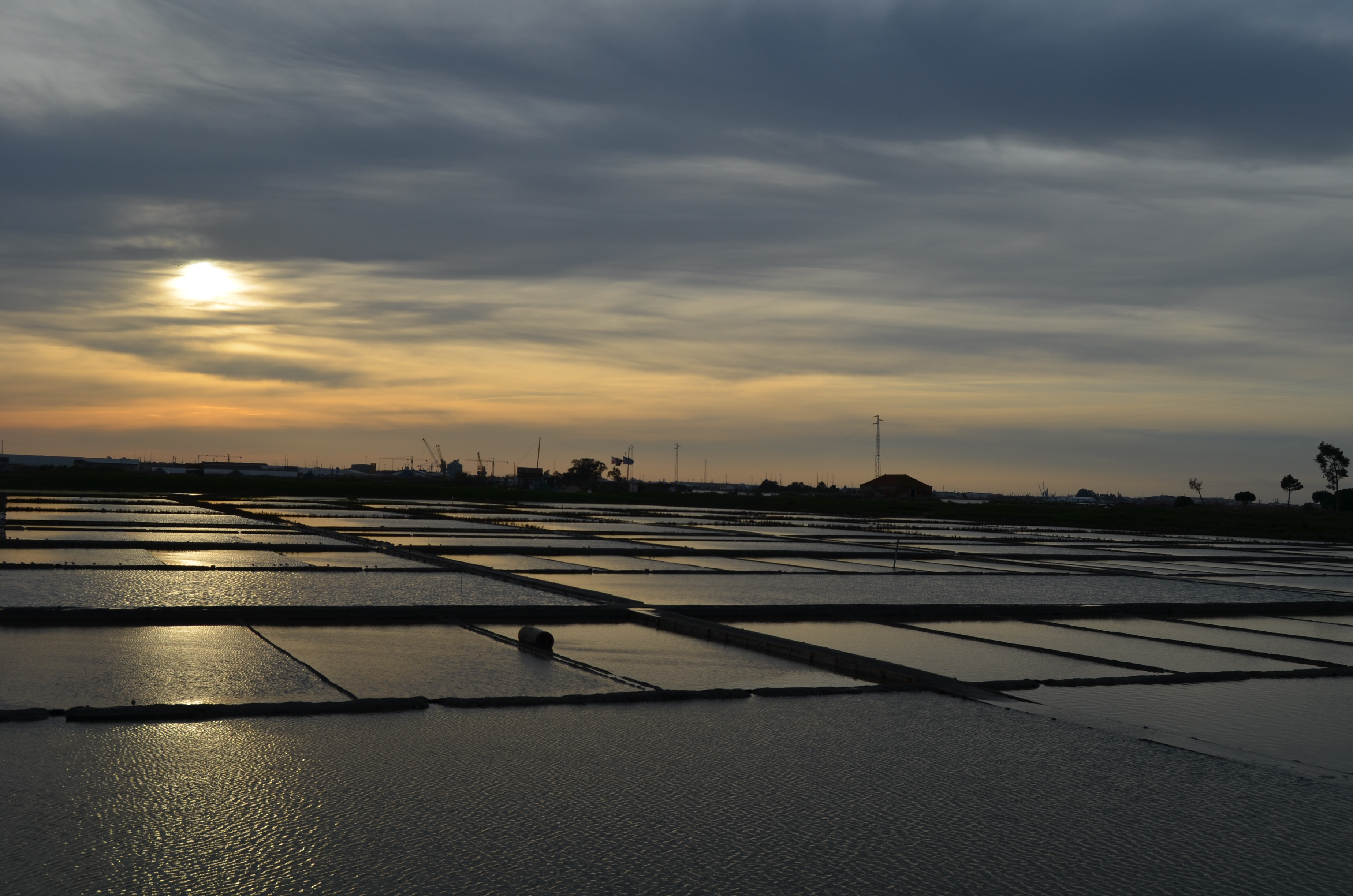 Watching you go away